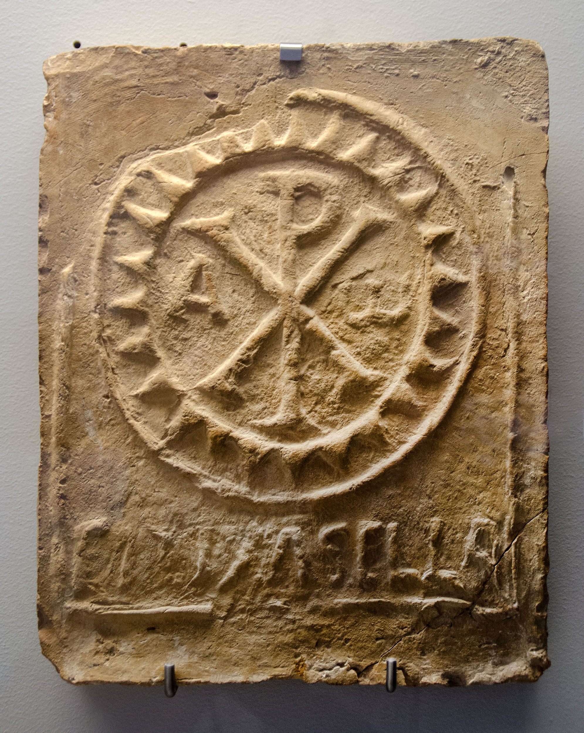 Ladrillo con un crismón datado en los siglos VI-VII. Procede de la Finca Los Arroyos de Puente Genil, Córdoba.